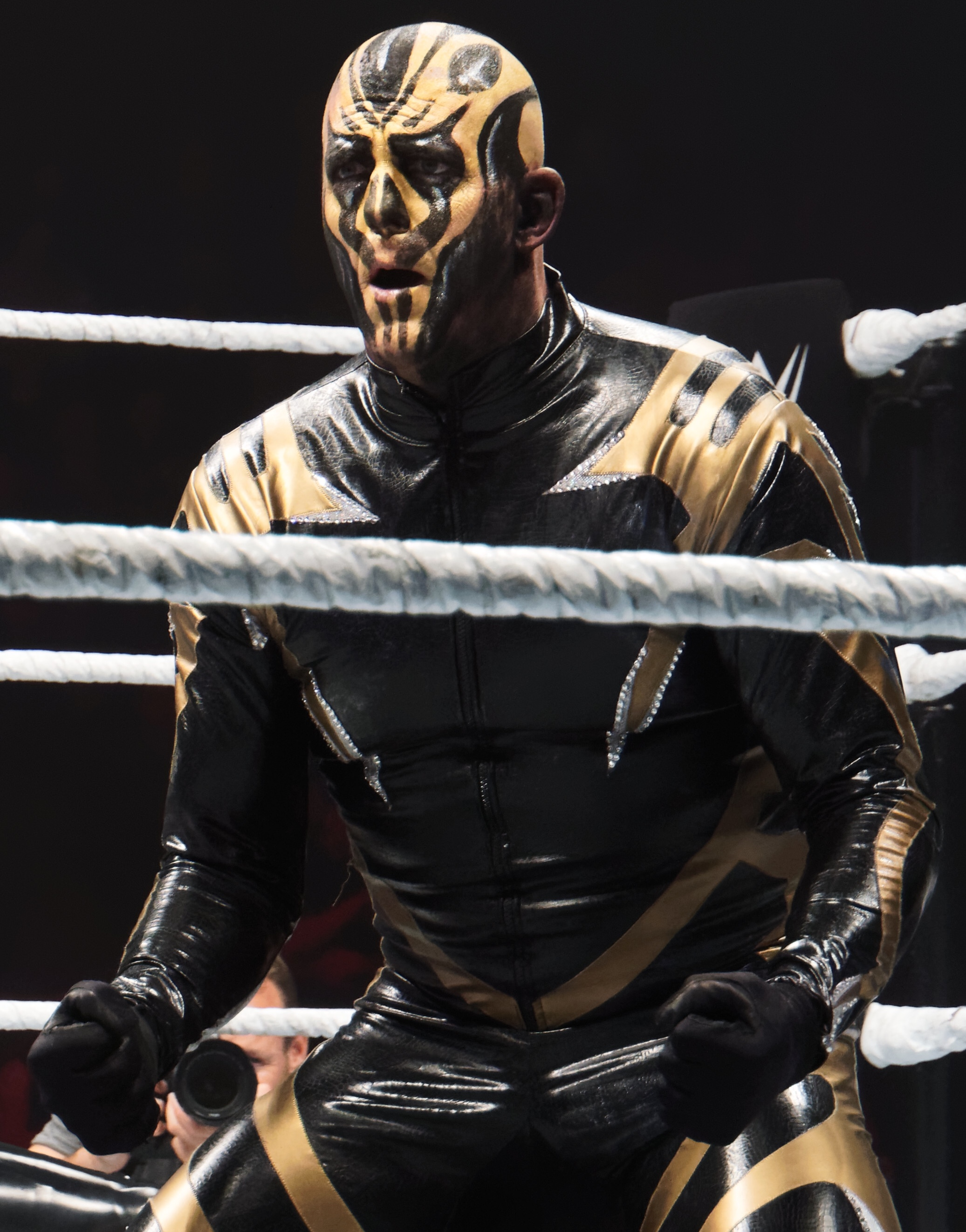 WWE Live@Lotto Arena - Antwerpen